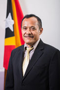 António Verdial de Sousa, Abgeordneter des Nationalparlaments Osttimors